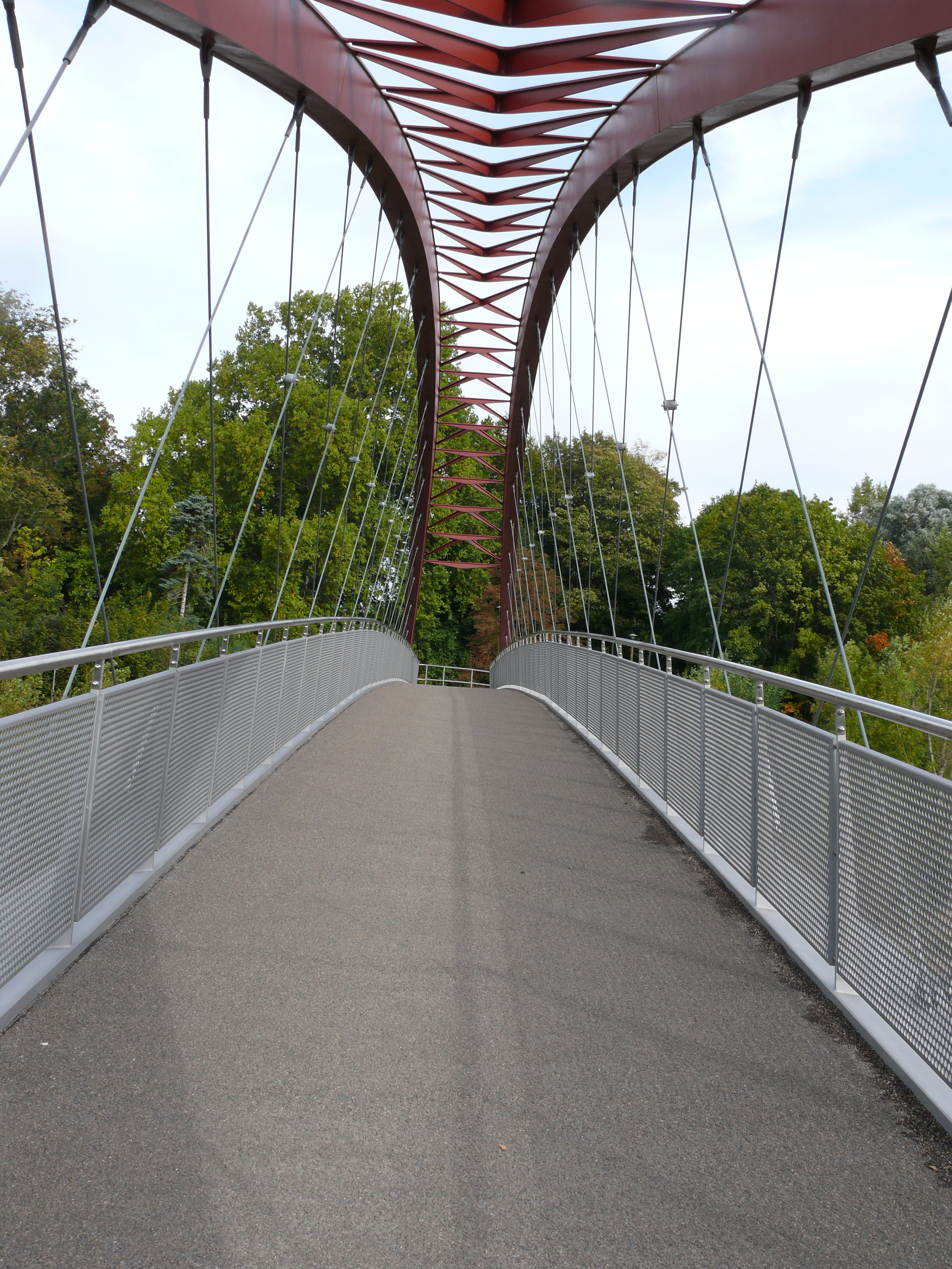 Schloßbrücke in Riesa-Gröba, von Süden fotografiert